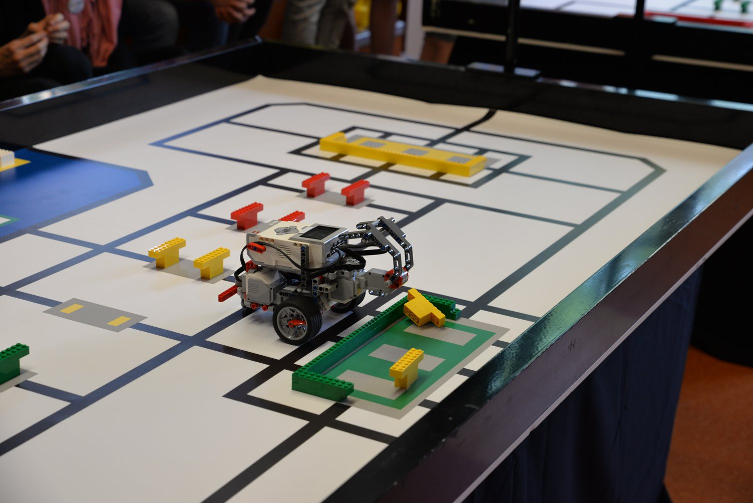 WRO_seizoen_2018_wedstrijdrobot.jpg